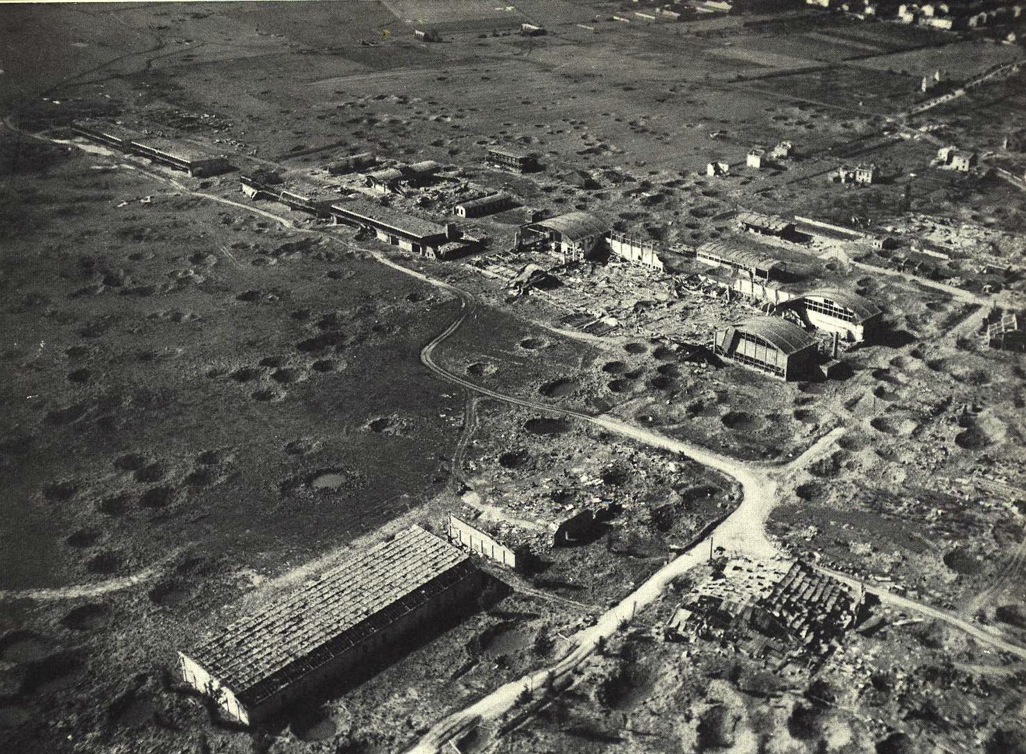 Vue aérienne du site de la Caserne Kléber et de l'aérodrome d'Essey-Nancy le 18 août 1944, après les bombardement alliés.